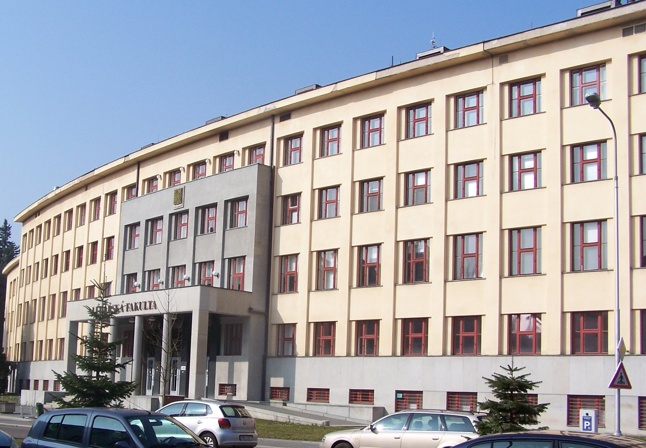 Universita - lékařská fakulta (Hradec Králové), Šimkova 870/13, Hradec Králové